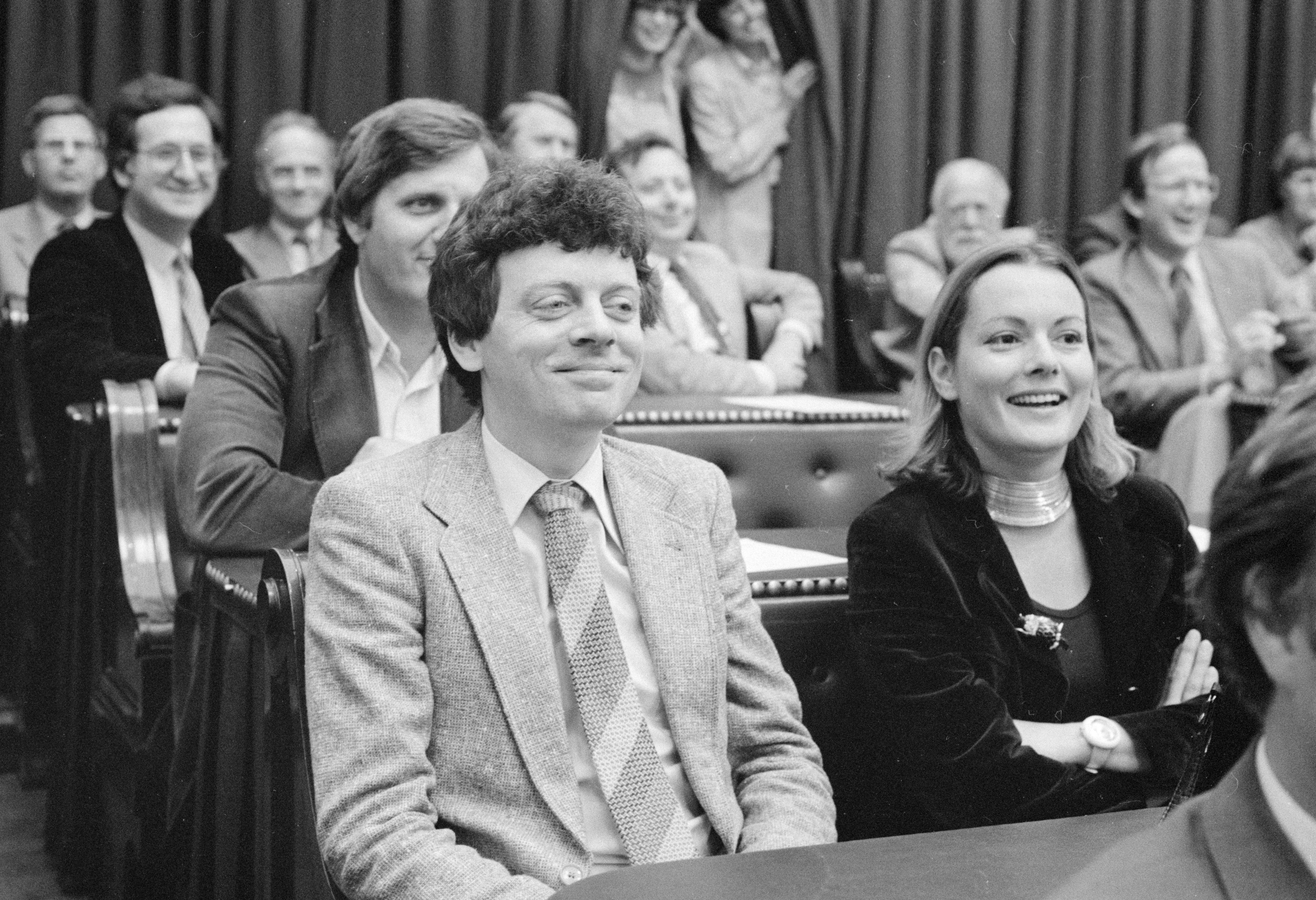 Nationaal Archief Beschrijving: Afscheid van de Kamerleden die niet in de nieuwe Kamer komen in de Rooksalon van de Tweede Kamer ; Nijhof (DS70) en Bisschoff van Heemskerck (D66) Datum: 9 juni 1981 Bestanddeelnummer NL-HaNA_Anefo_931-5314 Vervaardiger: Dijk, Hans van / Anefo URL: Voor meer informatie over het Nationaal Archief: Voor meer foto's uit deze en andere collecties, bezoek onze Beeldbank:, U kunt ons helpen onze kennis van de fotocollecties te verrijken door tags en commentaren toe te voegen. Herkent u mensen of locaties of heeft u een bijzonder verhaal te vertellen bij één van de foto's, laat dan een reactie achter (als u ingelogd bent bij Flickr) of stuur een mailtje naar